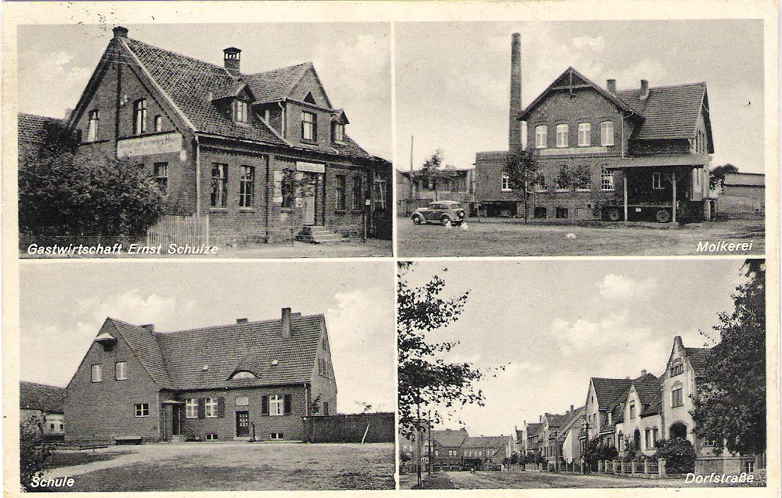 Vier-Bilderpostkarte aus Clüden gestempelt 1923.